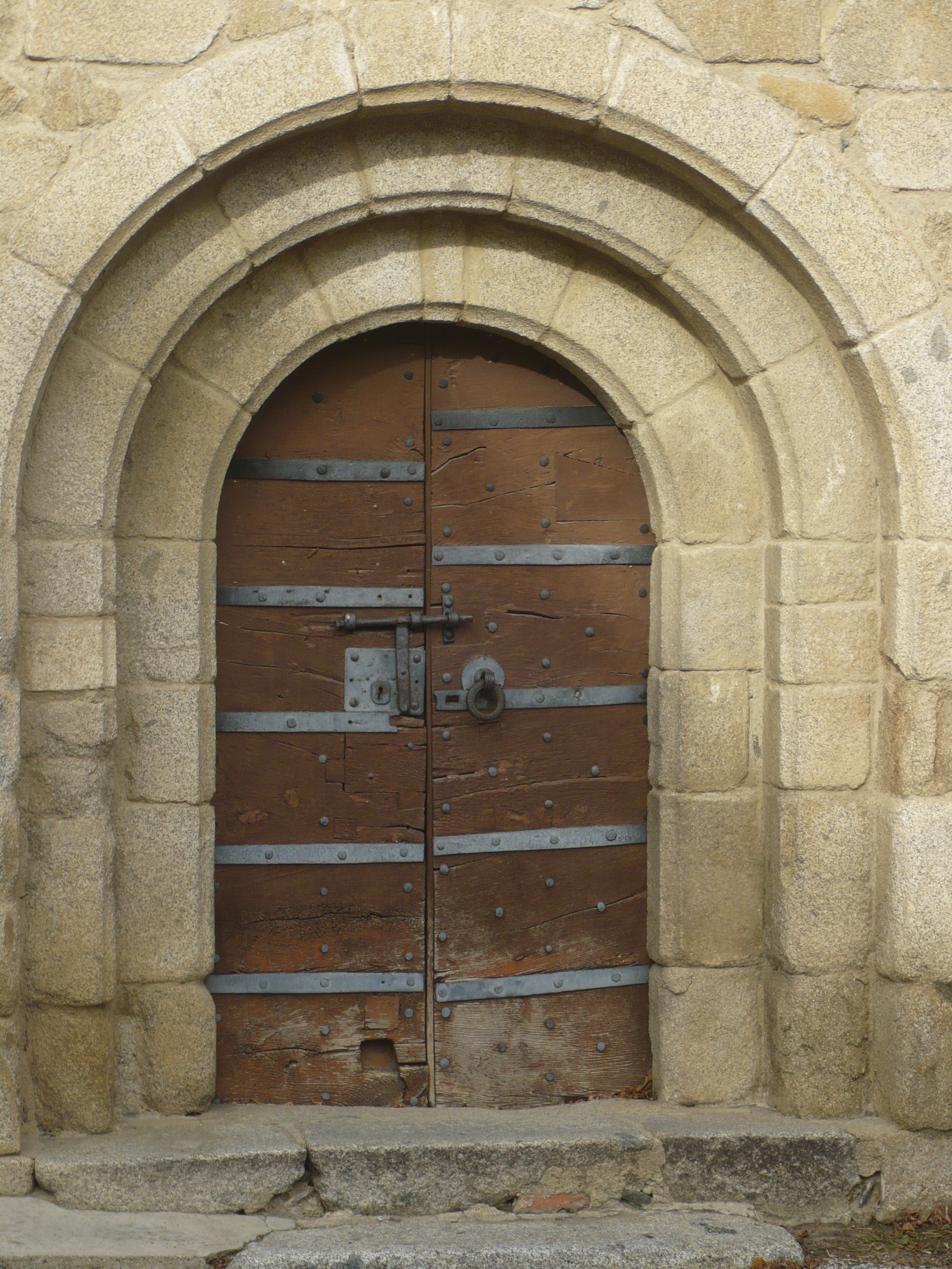 Portail de l'église Saint-Julien d'Estavar